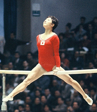 Taniko Nakamura-Mitsukuri at the 1964 Olympics